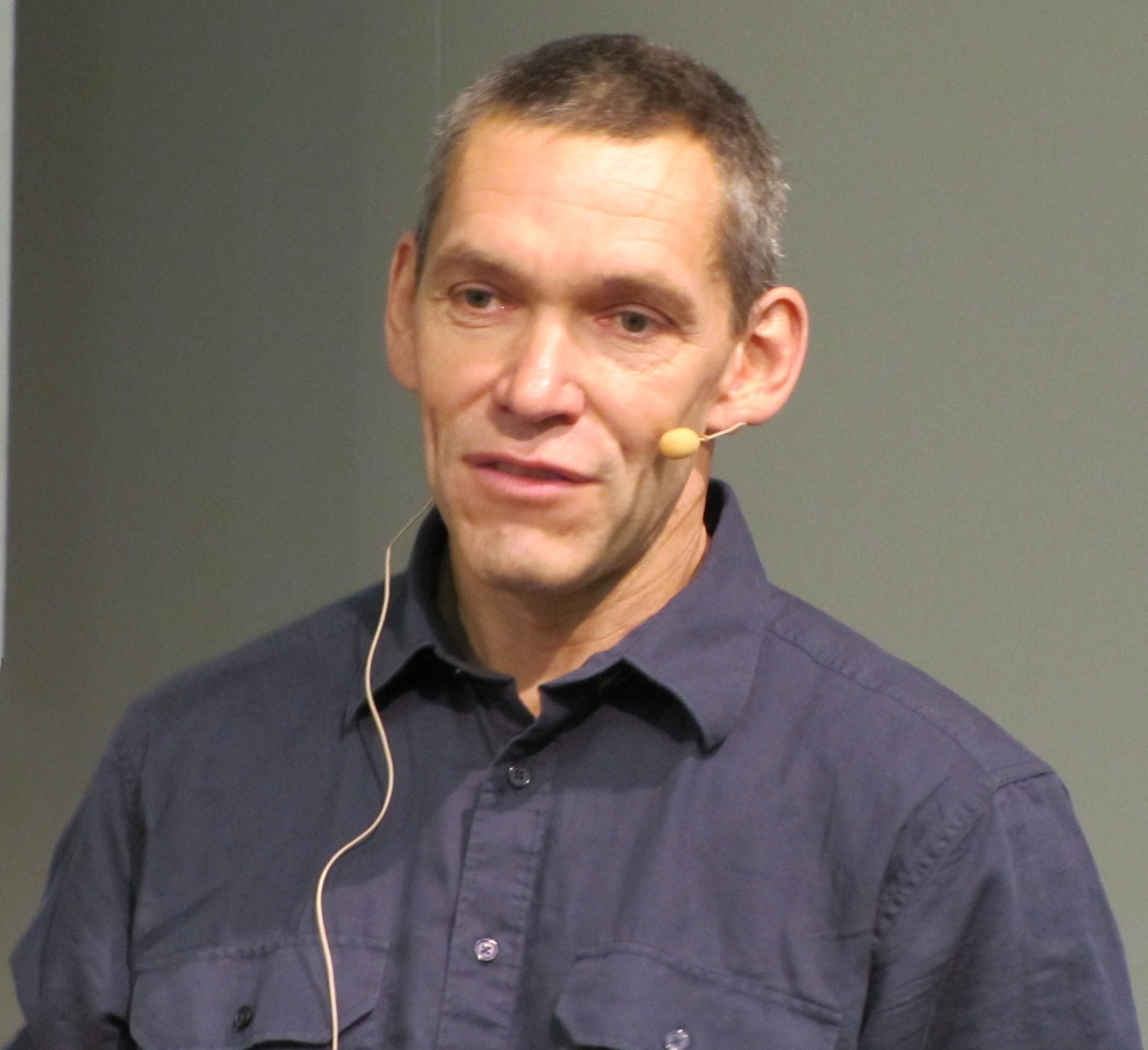 Johan Rönnby, professor i arkeologi med marinarkeologisk inriktning.